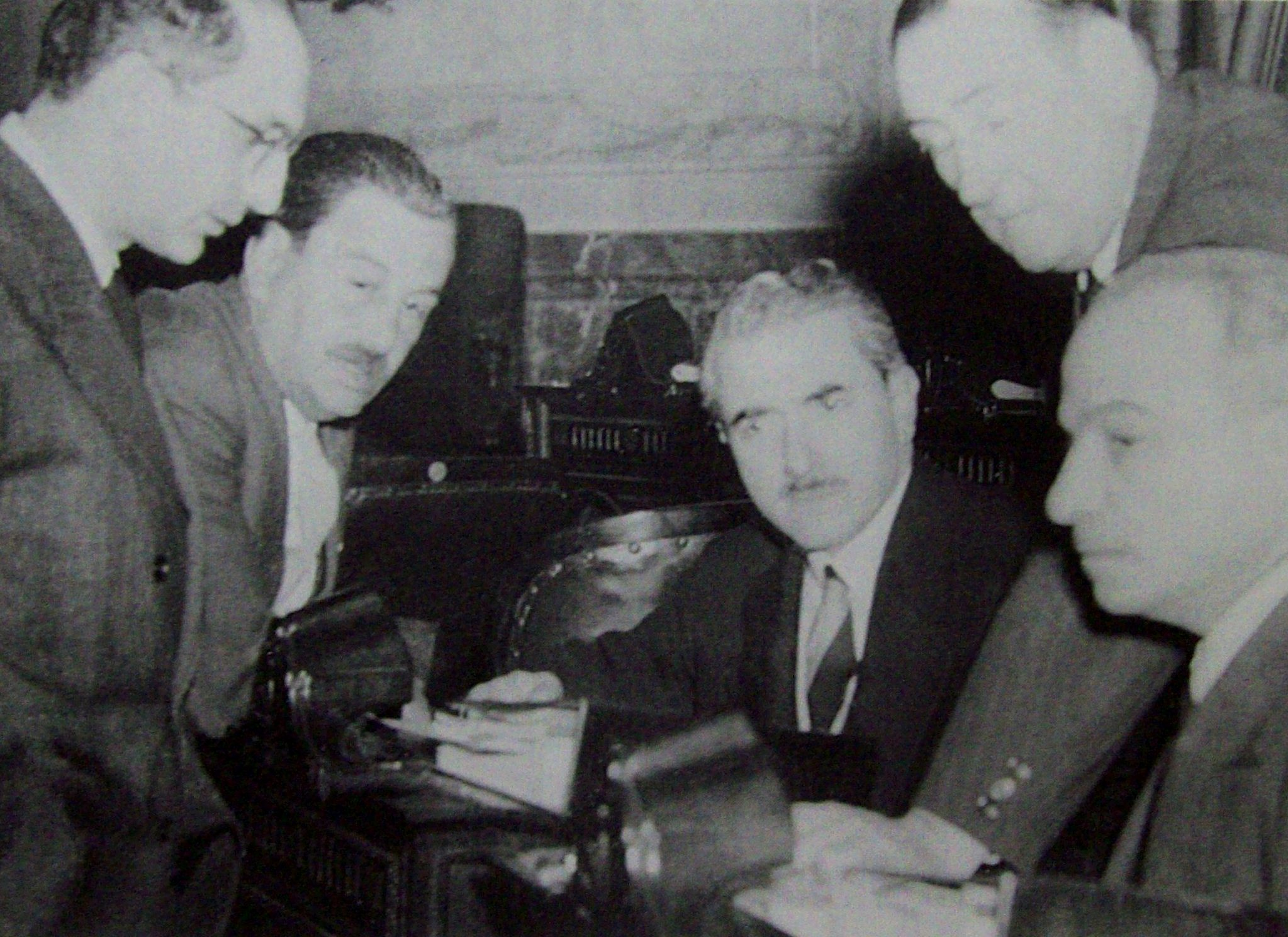 Es una foto de los diputados del llamado "Bloque de los 44". En la foto se pueden distinguir a Arturo Frondizi y Ernesto Sammartino.